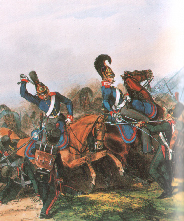 Kurhessisches Leib Dragoner Regiment